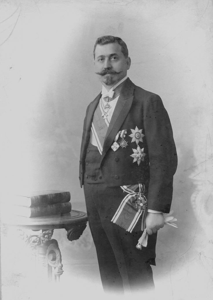 Министър Лазар Паяков. Фотография около 1908 г.